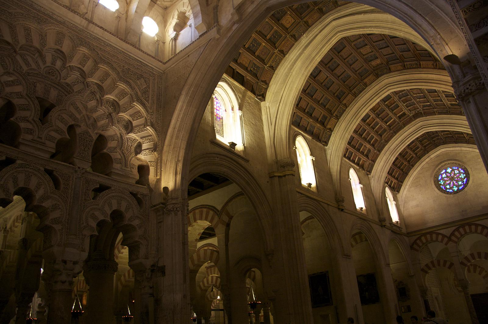 Capilla de Villaviciosa de la Mezquita de Córdoba, Córdoba (España).